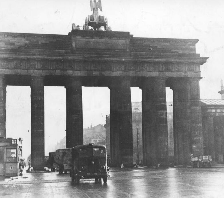 Scherl NSKK-Kolonnen mit Waffen für den Berliner Volksturm Tag und Nacht rollen LKW-Kolonnen, die das NSKK für diesen Zweck zusammenstellte, mit Waffen und Munition, Verpflegung und Ausrüstung zu den Einsatzbataillonen des Berliner Volkssturms. PK-Aufnahne: Kriegsberichter Mölich /T0-EP, 13.2.